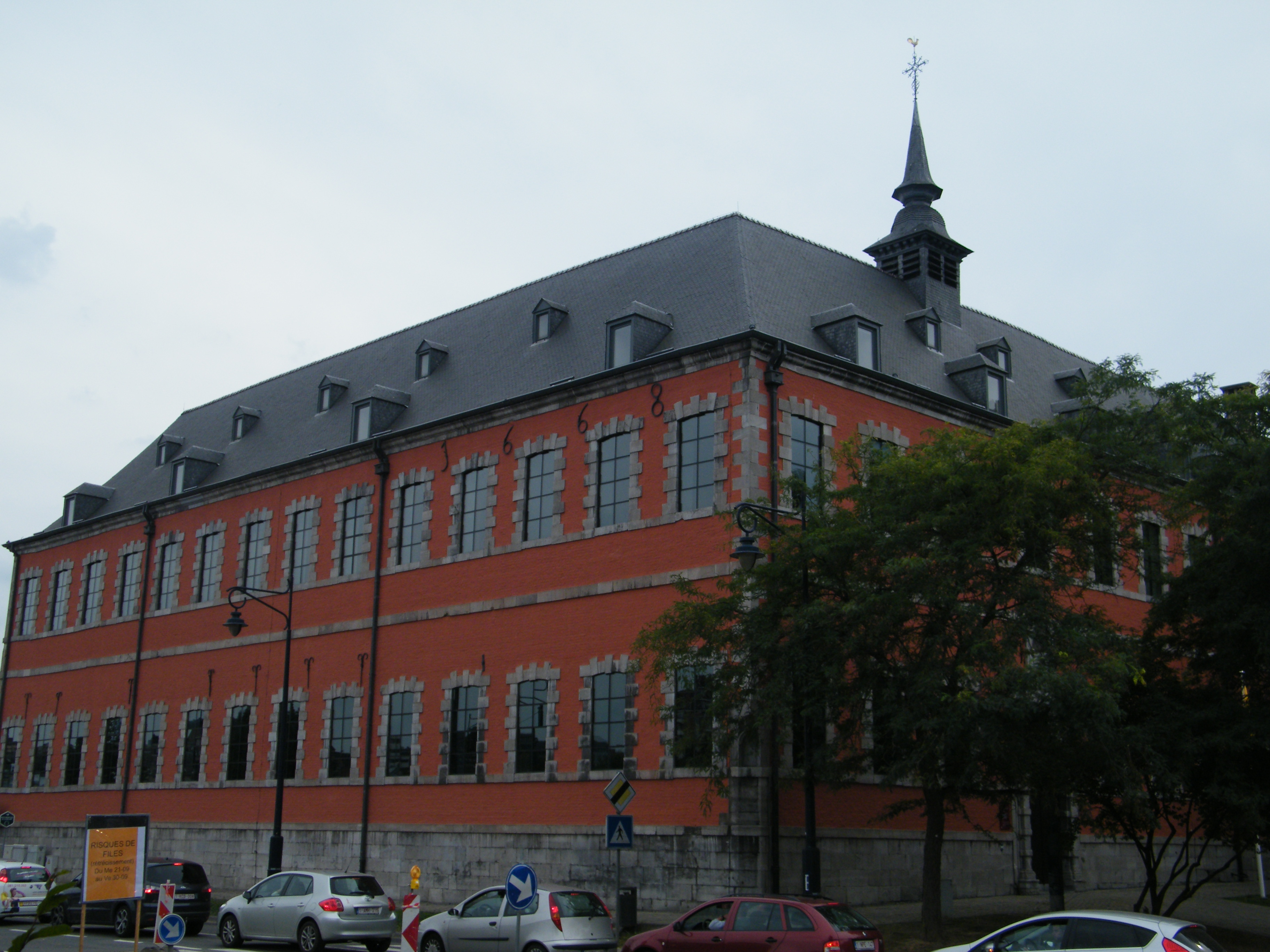 Hospice Saint-Gilles, Namur Depuis 1998, c'est le siège du parlement de Wallonie de Belgique